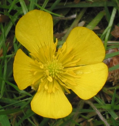 foto van bloem van kruipende boterbloem